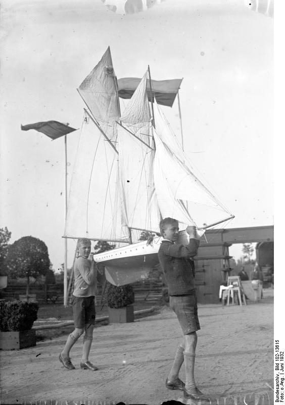 Zwei tüchtige Berliner Jungen mit einem selbstgebauten Segelschiff ! Die beiden Bootsbauer bringen ihr selbstgebautes Segel-Boot ins Wasser zur ersten Jungfernfahrt.